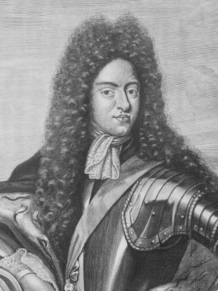 Porträt Kurfürst Johann Georg IV. von Sachsen (reg. 1691–1694)